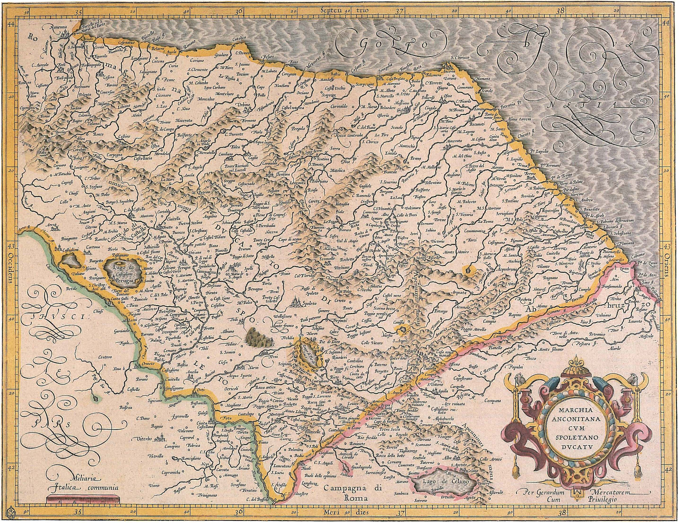 Marchia Anconitana cum Spoletano Ducatu, 1589 - Gerard Kremer (Mercatore)edita in Italiae, Sclavoniae et Graeciae tabulae geographicae, Duisburg(mm 350x450, Cartoteca storica delle Marche)